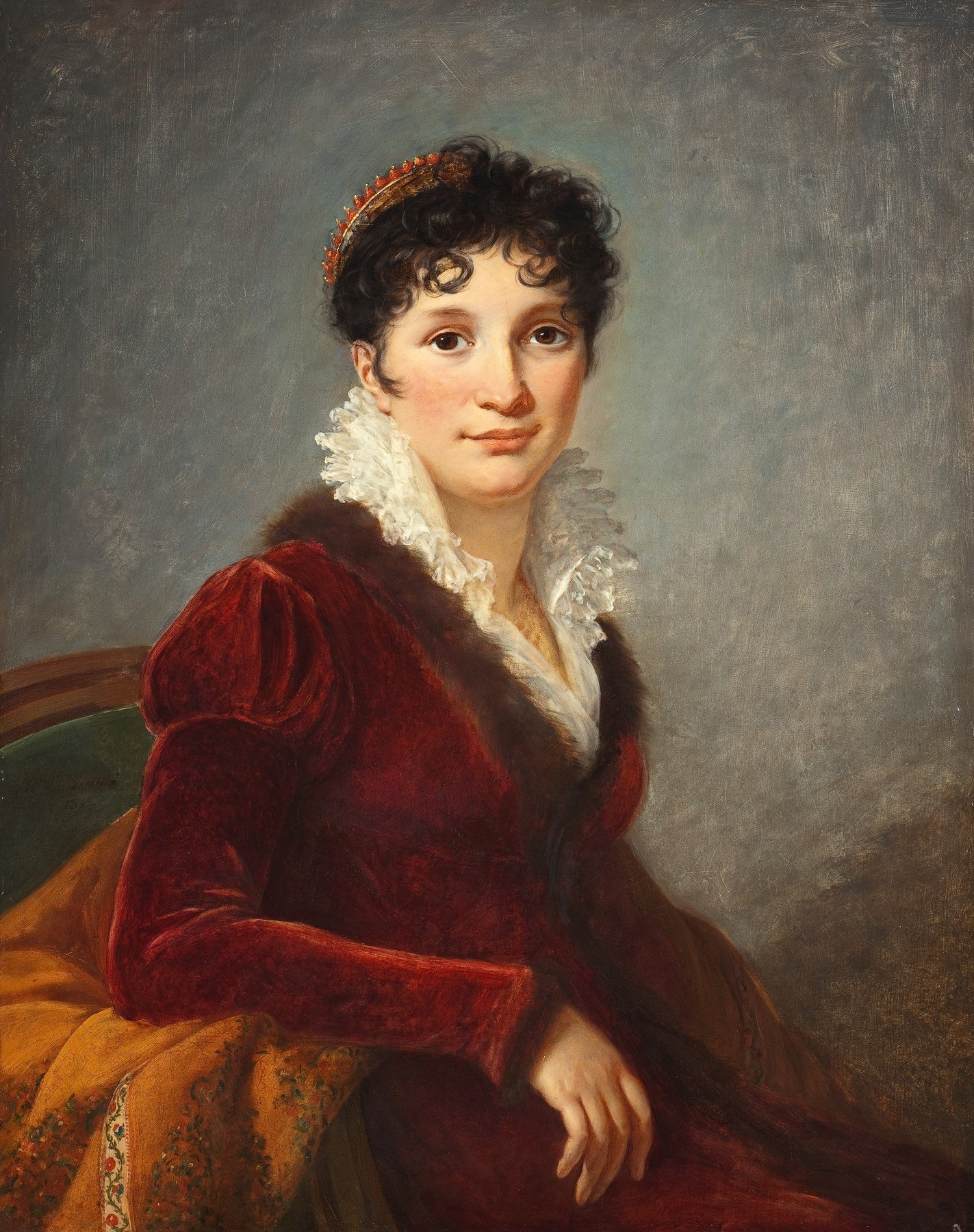 Antoinette Charlotte Luise Franziska, genannt Fanny Biron von Kurland (1790-1849), geborene Gräfin von Maltzan, Erbherrin auf Dyhernfurth in Schlesien.